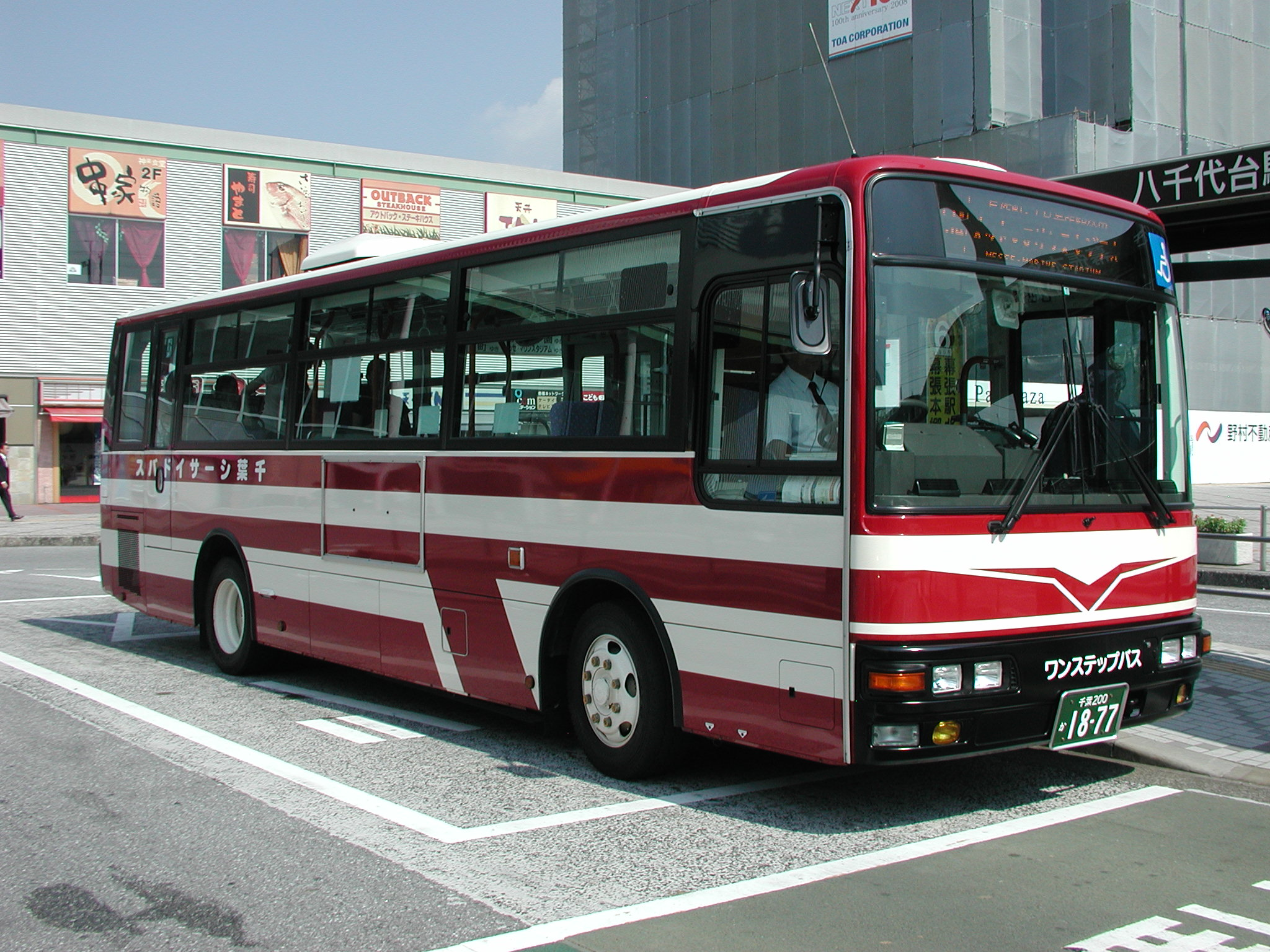 千葉シーサイドバス 中型ワンステップ車両（三菱ふそう・エアロミディMK：PA-MK25FJ/元：東洋バス） 海浜幕張駅にて